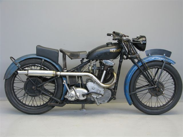 P&M Panther 350 cc "80 Redwing" motorcycle from 1936